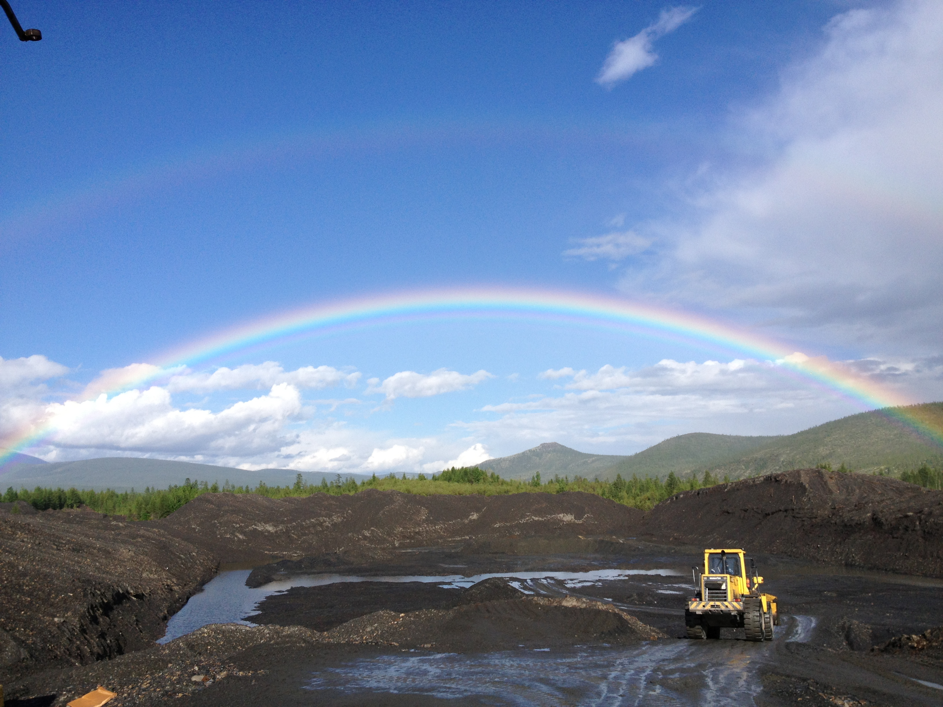 Сусуманский район, Магаданская область, РФ This image is related to the protected area of Russia number 4910047